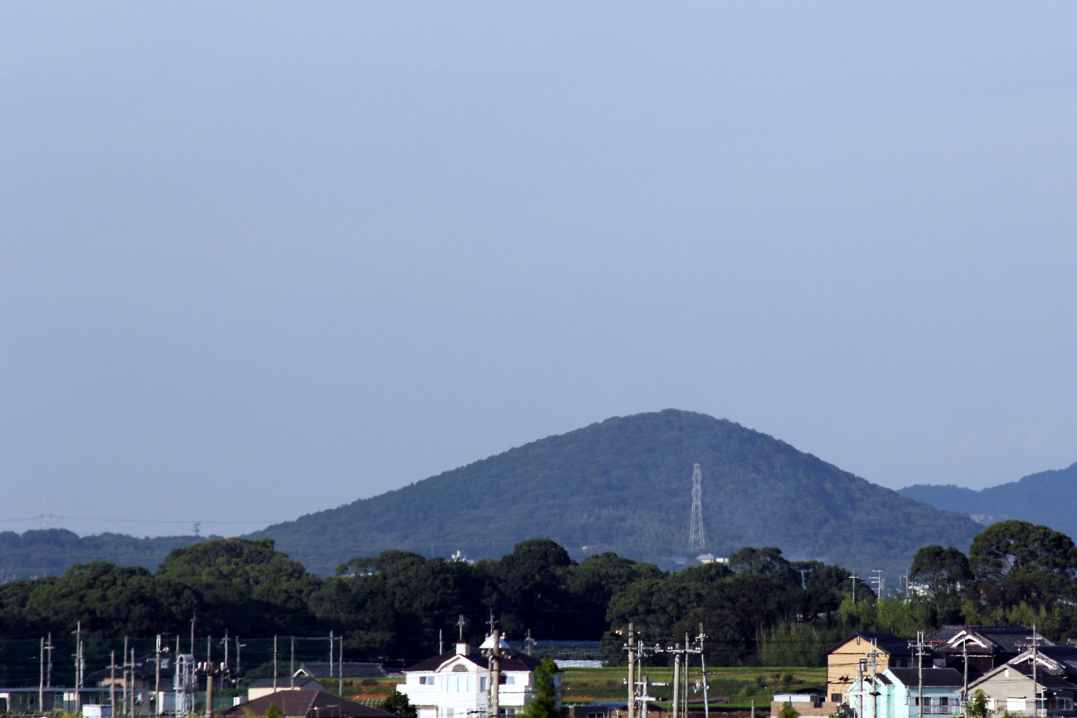 雄岡山（神戸市）